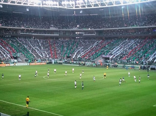 Palmeiras versus Corinthians pelo Campeonato Brasileiro de 2018 no Allianz Parque